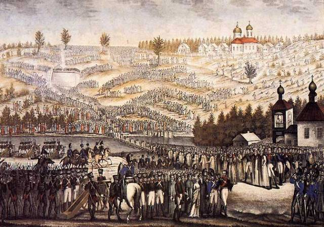 А. Афанасьев. «Историческое изображение торжества, происходившего при заложении храма Христа Спасителя на Воробьевых горах 12 октября 1817 года». Гравюра пунктиром, раскрашенная акварелью.